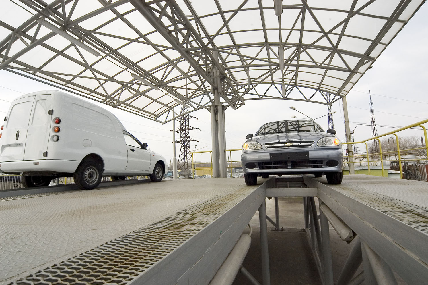 Осмотр автомобилей ZAZ-Sens на эстакаде в цеха сдачи Запорожского Автомобилестроительного Завода. Собственное производство.